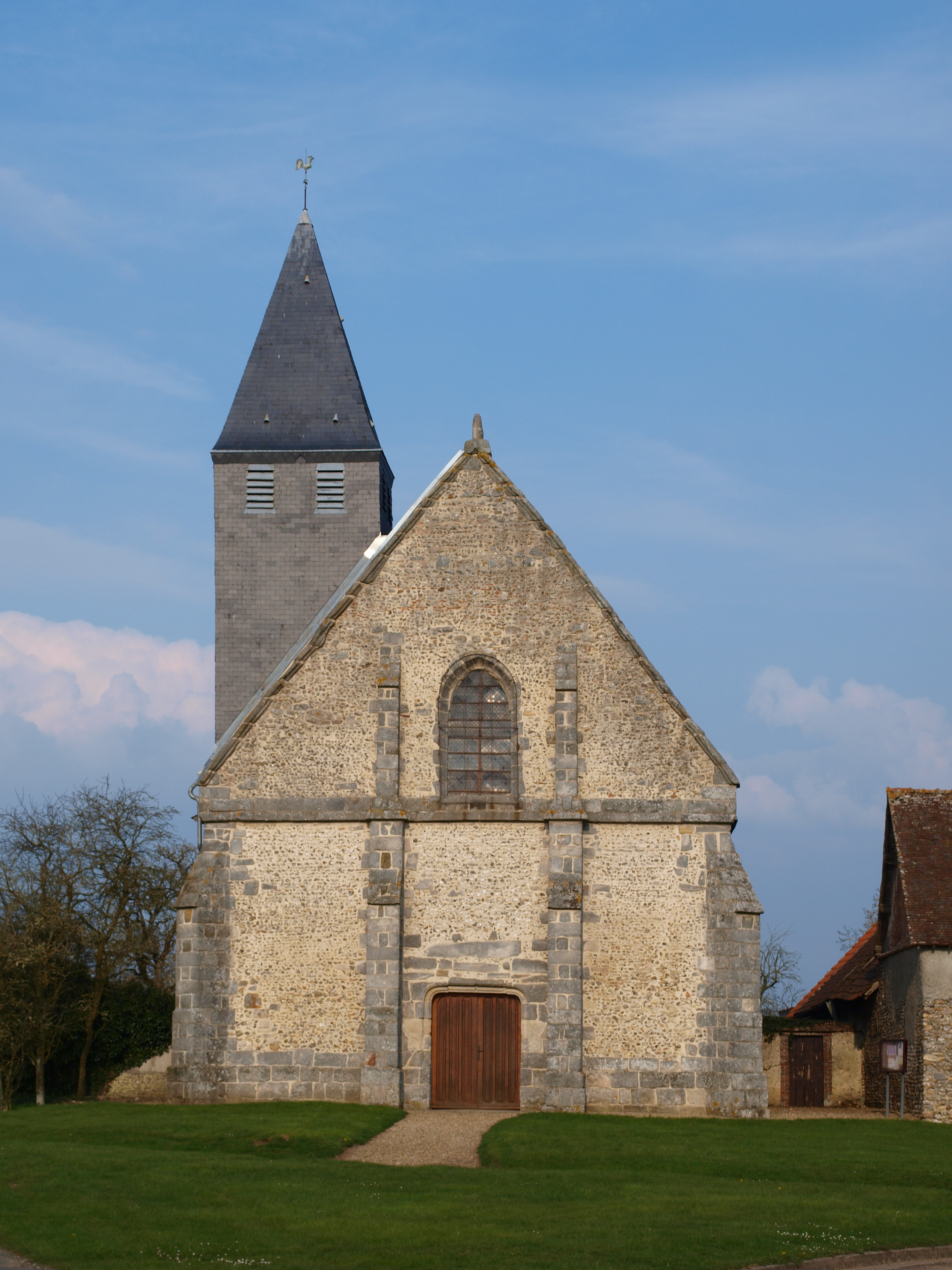 Saint-Laurent-la-Gâtine (Eure-et-Loir , France) ; le village